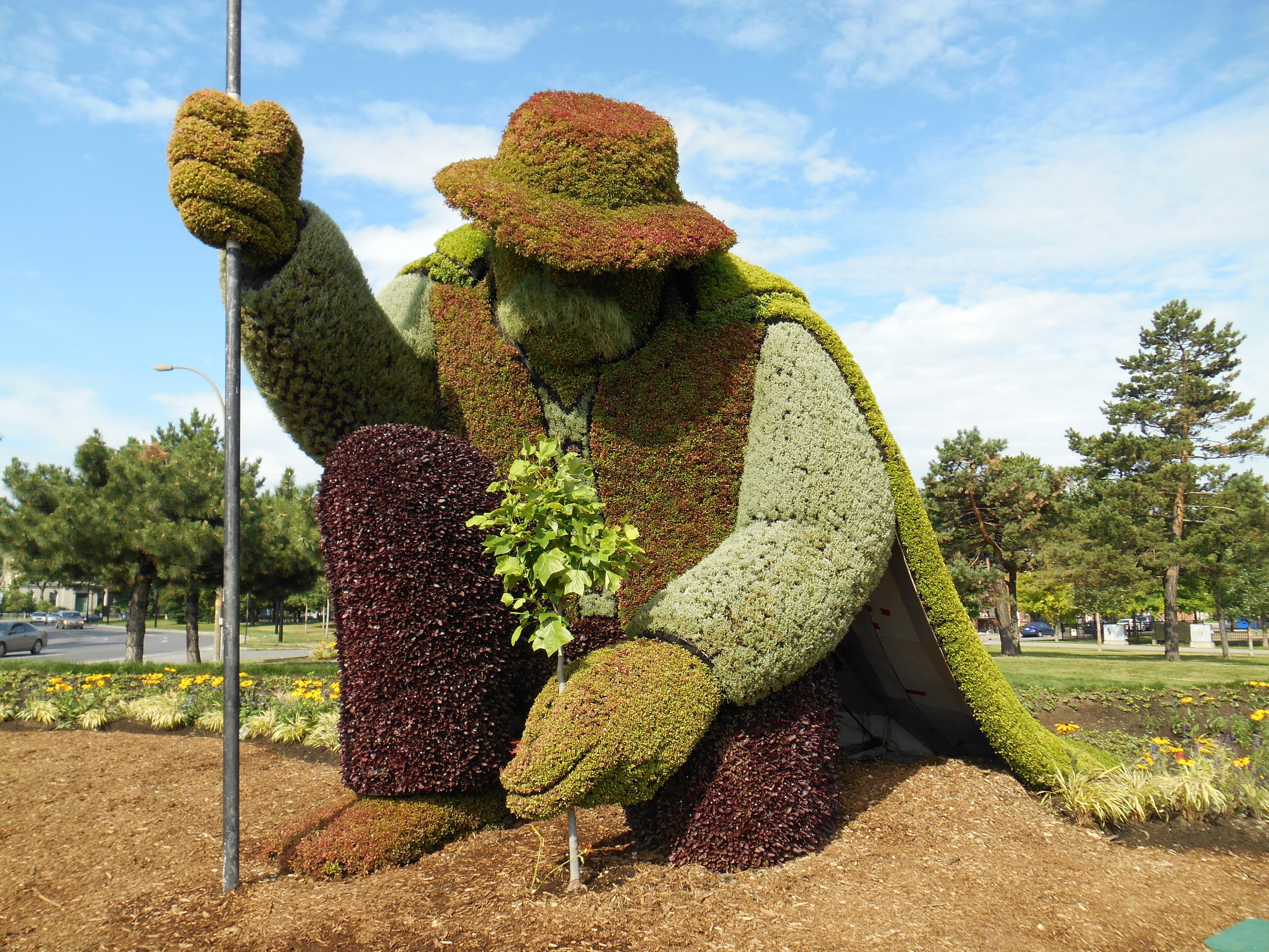 La mosaïculture L'Homme qui plantait des arbres, inspirée des dessins de Frédéric Back, au parc des Faubourgs, à Montréal.